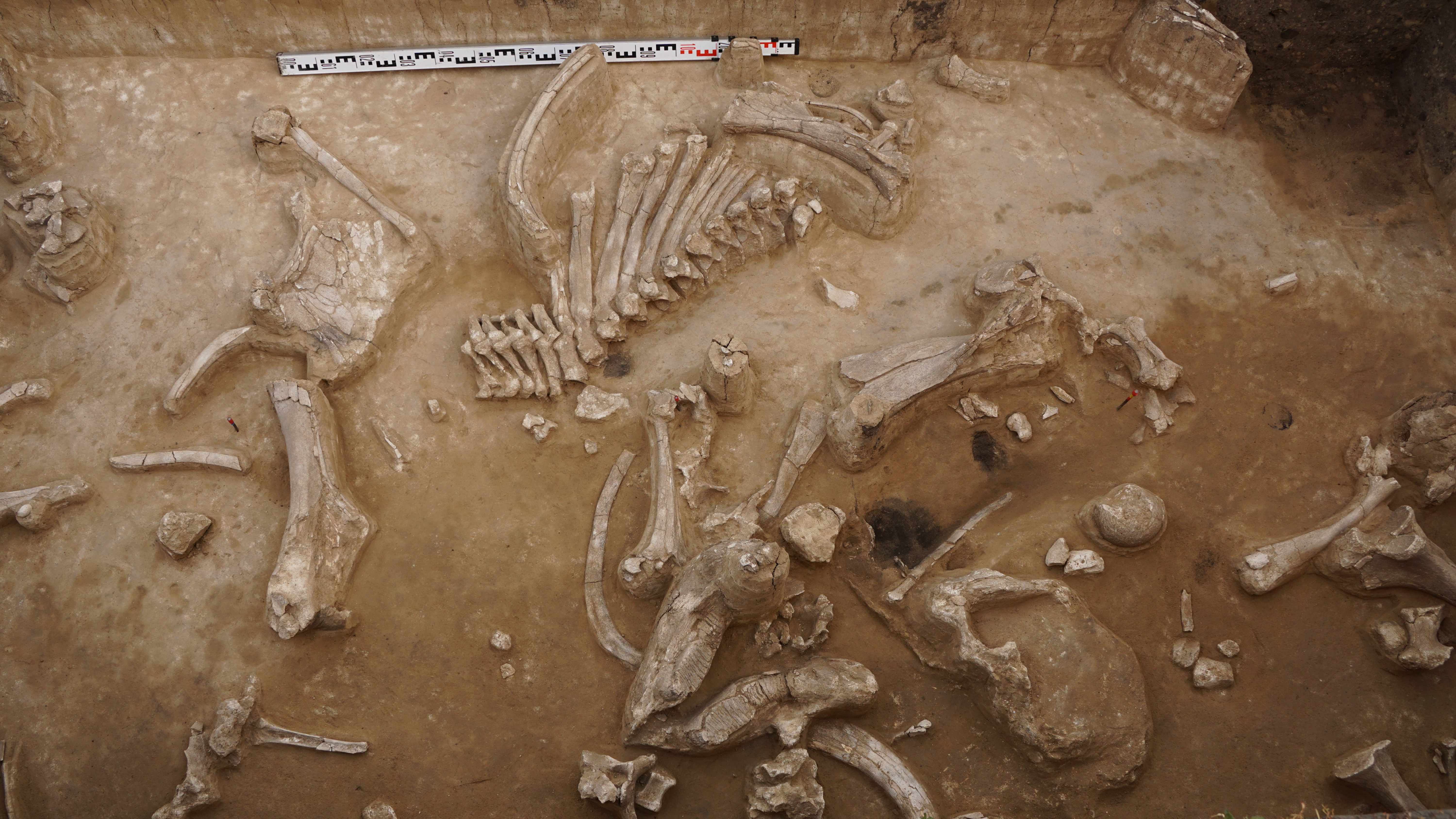 На изображении видно анатомическое сочленение позвонков мамонта